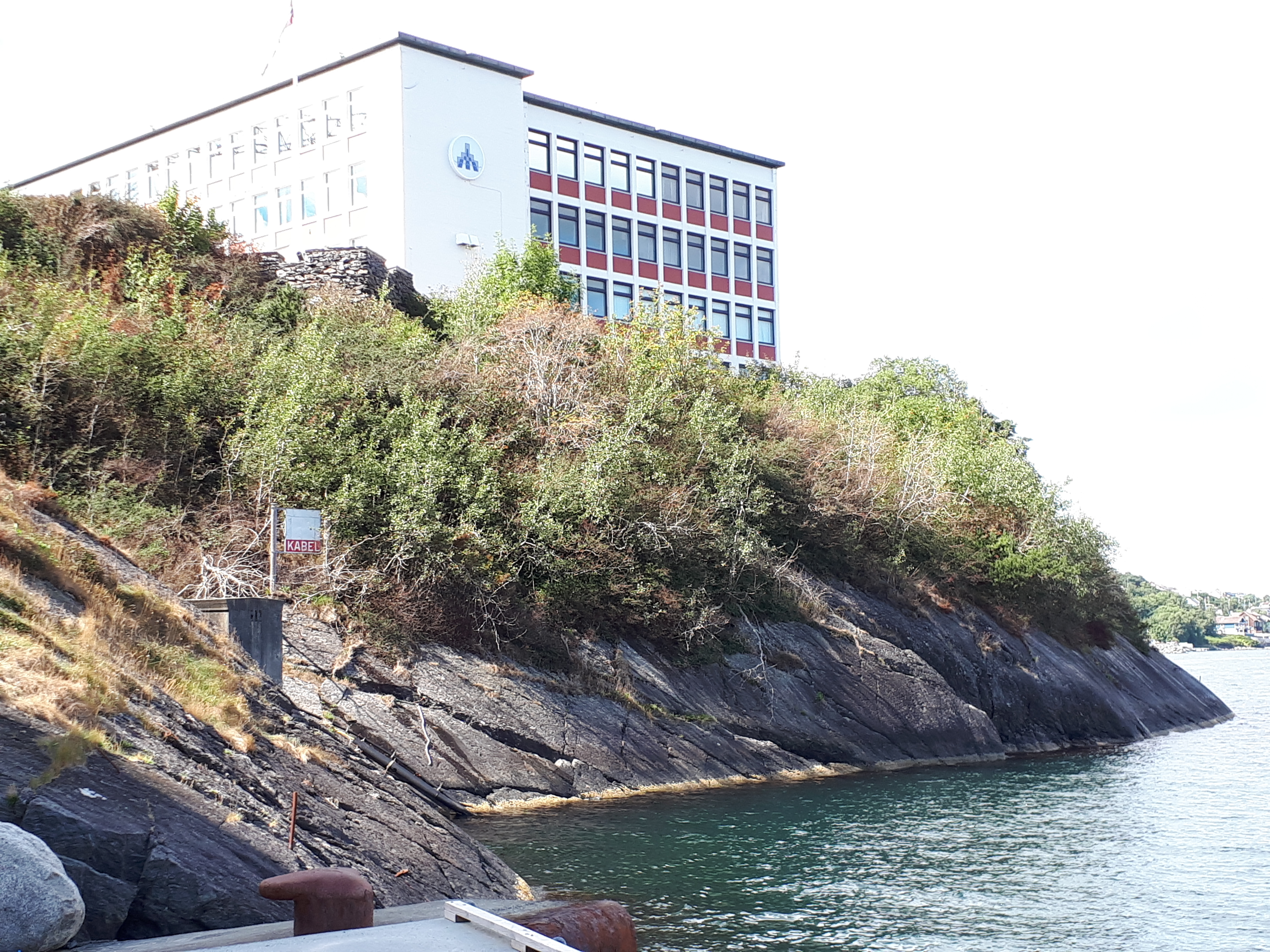 Kalhammaren i Stavanger sett fra sjøsiden.